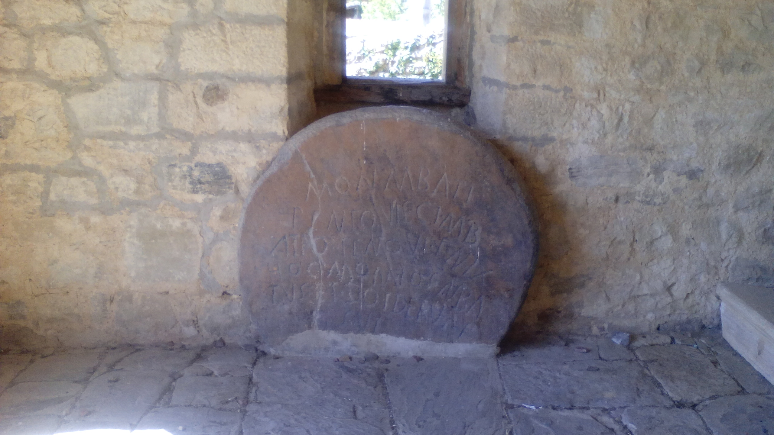 Imagen de la estela de Luriezo.